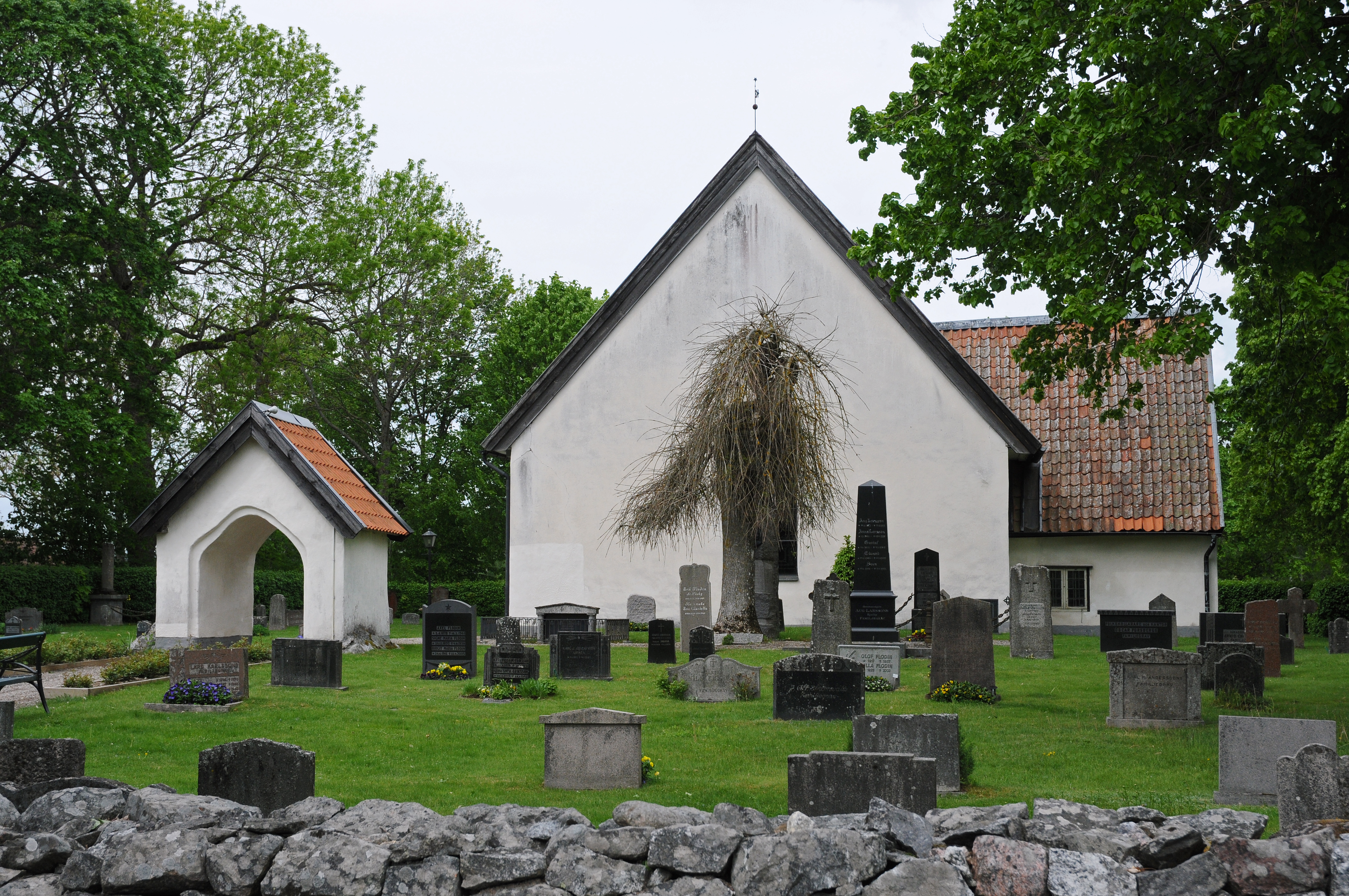 Blacksta kyrka i Flens kommun